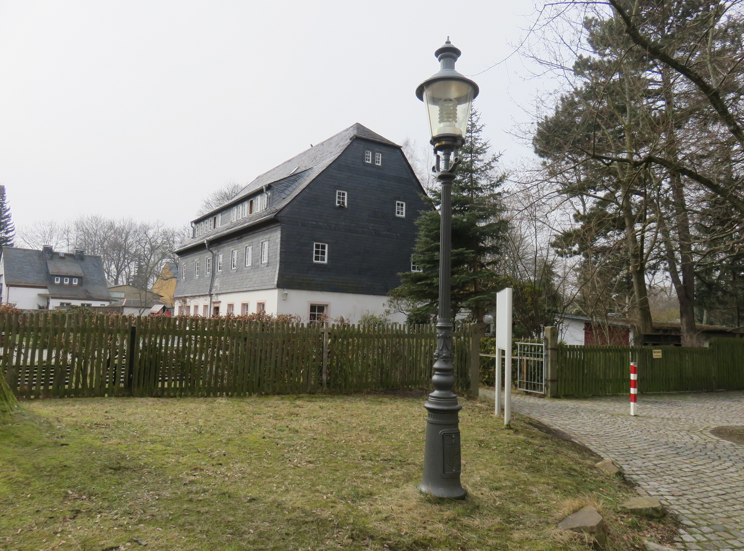 Pfarrhaus, Zwickauer Straße 516. Kulturdenkmal Chemnitz-Reichenbrand.